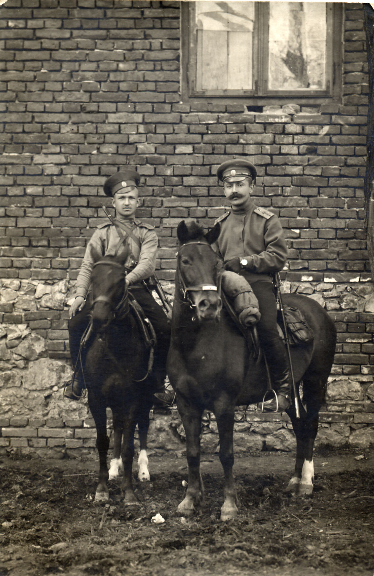 Фото из домашнего архива flandin